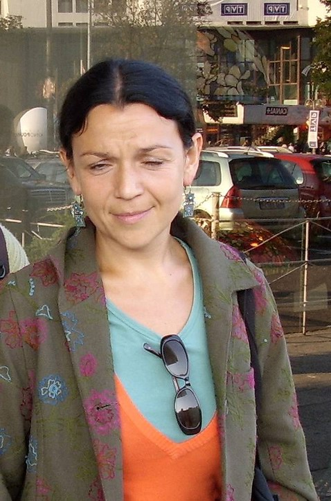 Joanna Kos-Krauze (ur. 8 grudnia 1972 roku w Olsztynie) - polska reżyser i scenarzystka.